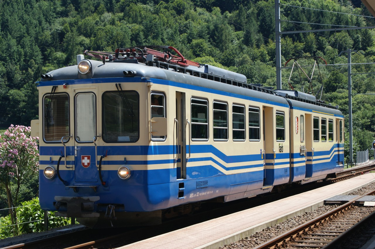 FART ABDe 6/6 32 als Leerfahrt in Intragna.